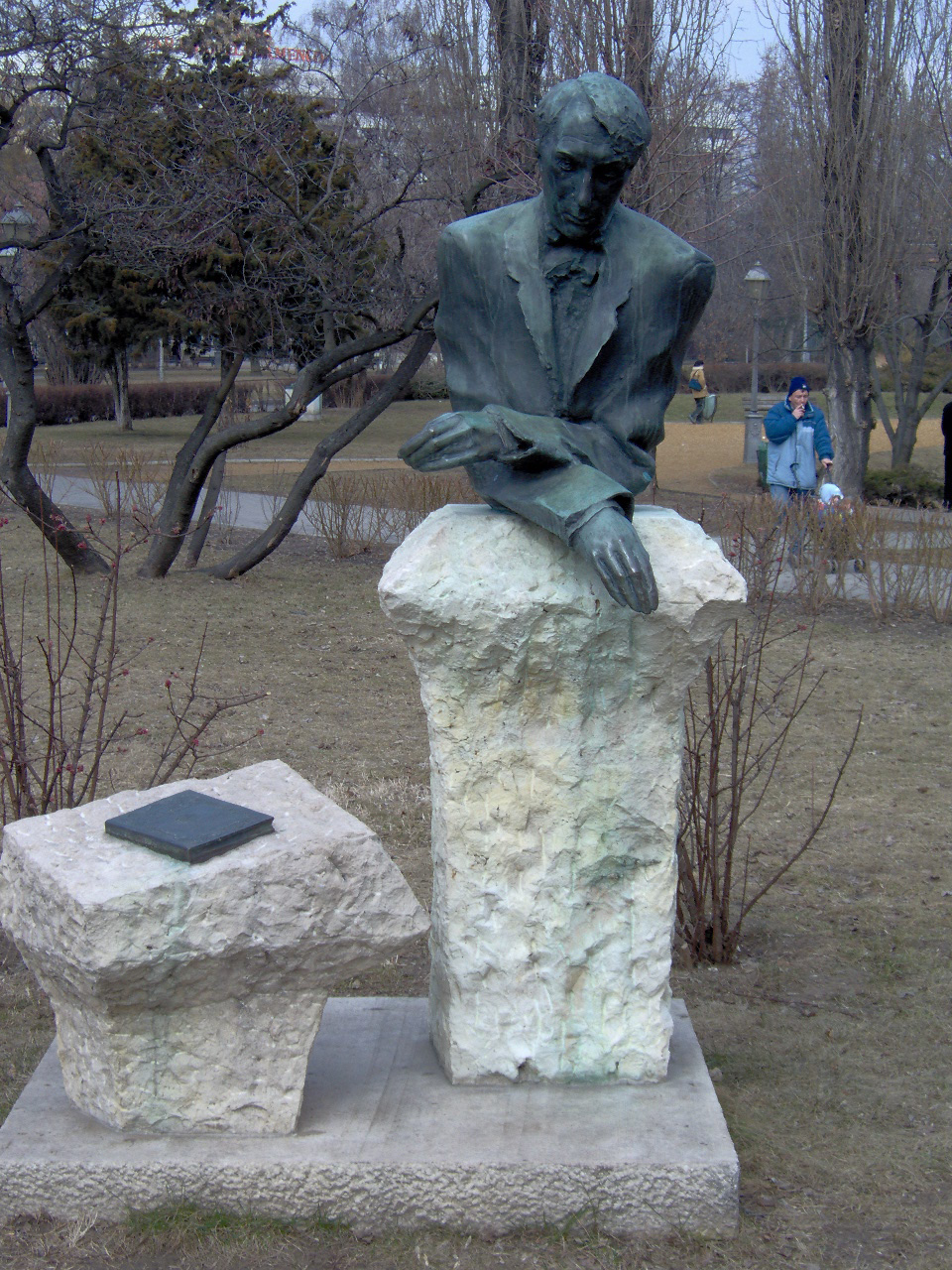 Borbás Tibor: Kosztolányi Dezső (1979). Köztéri szobor az újbudai Koszolányi Dezső téren.